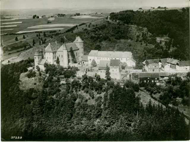 Luftbild Wildenburg, Auflösung 640 x 480 Pixel